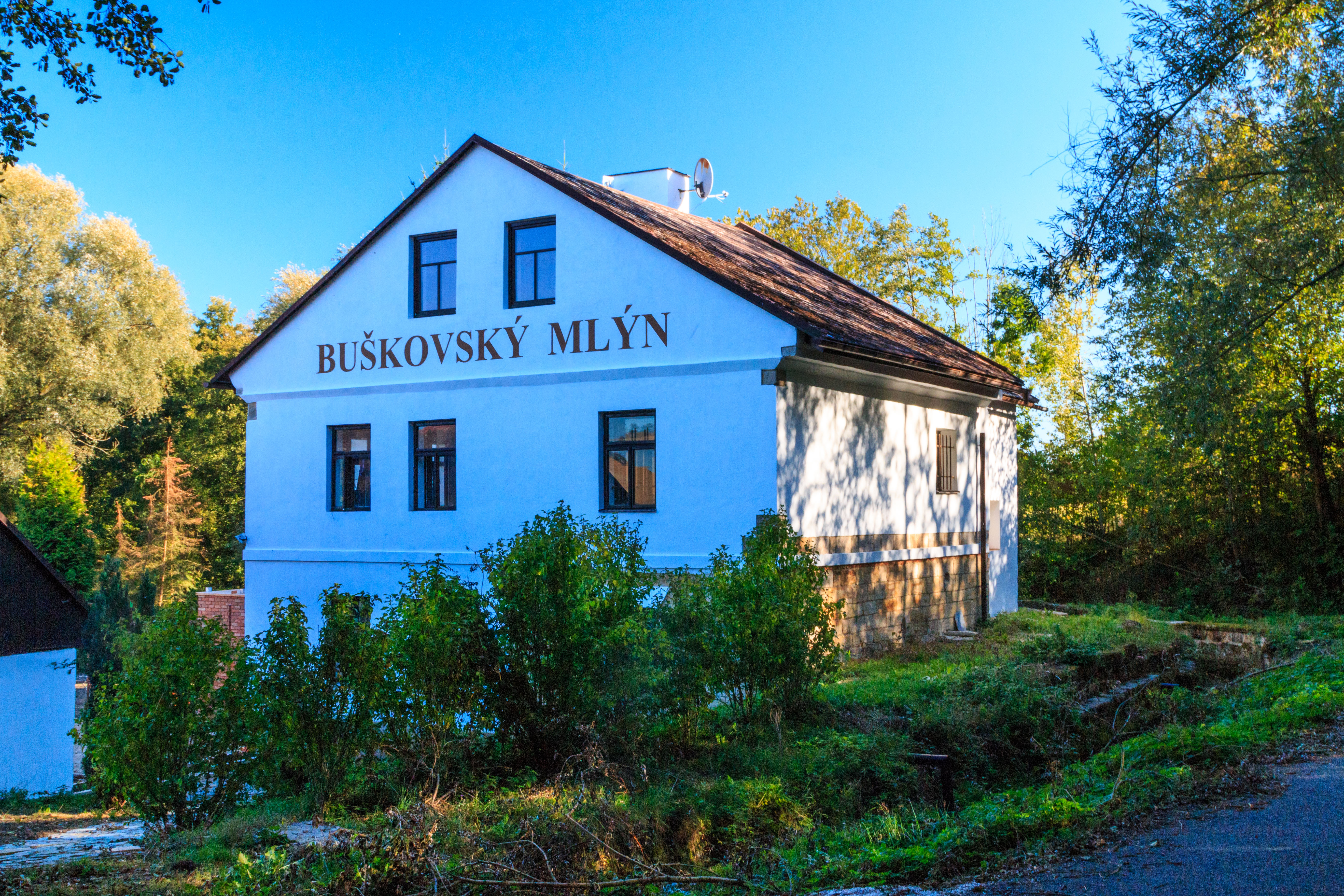 Buškovský mlýn Project: Vodstvo